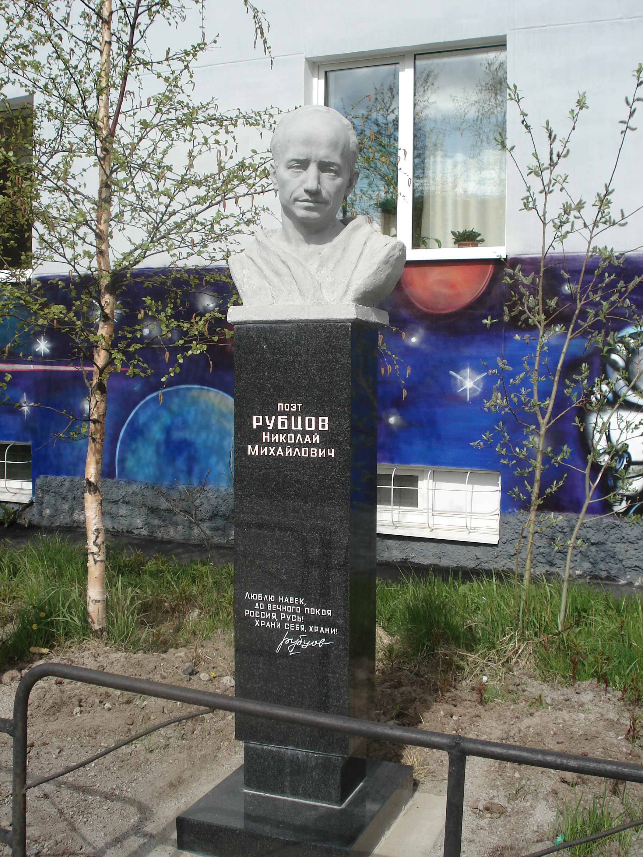 Бюст Рубцова